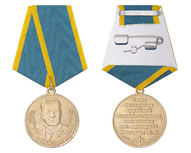 Медаль "Контр-адмирала Ю.И.Максюта"